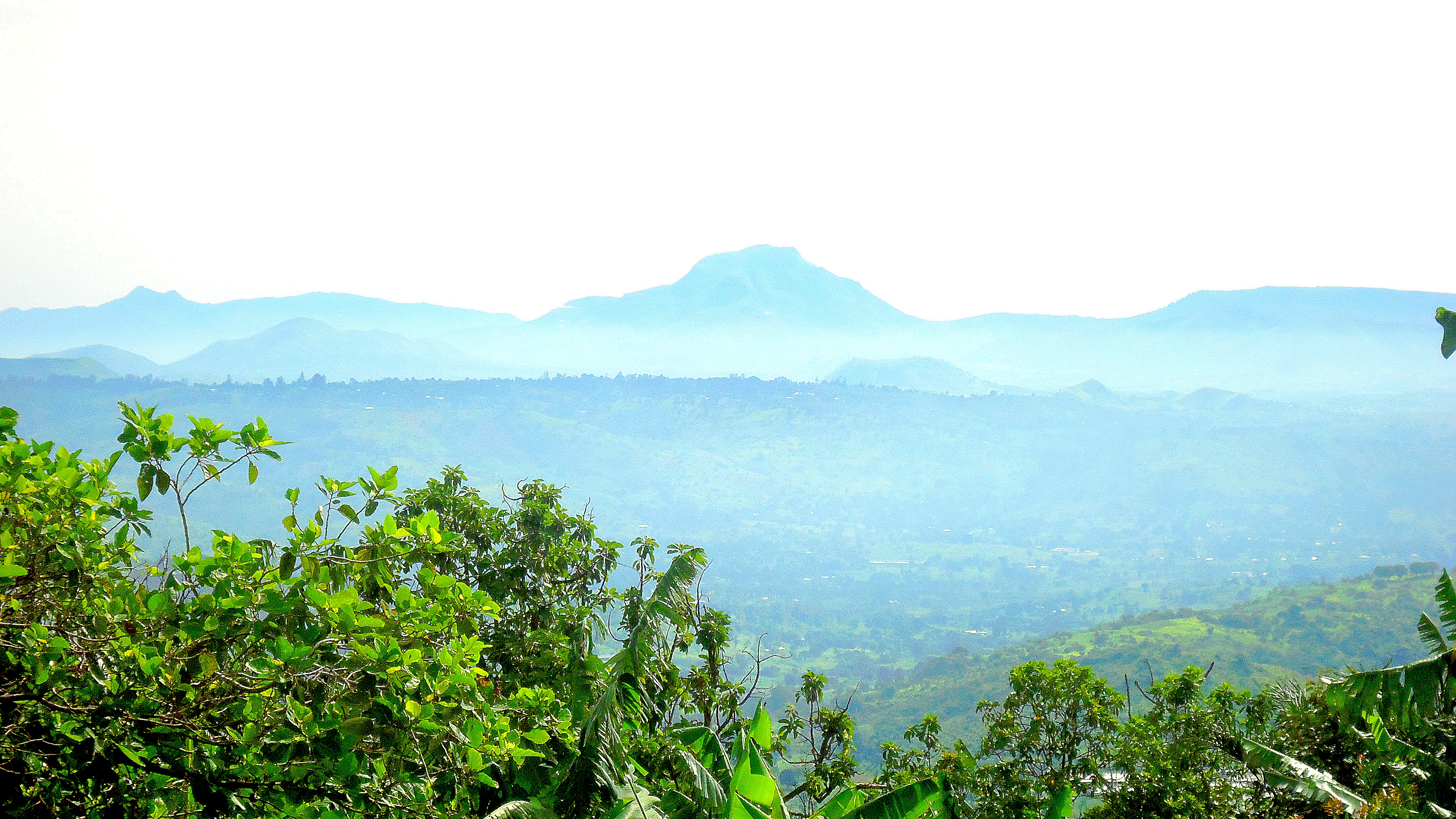 Cette image représente une vue du paysage filmé depuis des hautes terres du village Bandjoun, à l'Ouest du Cameroun.